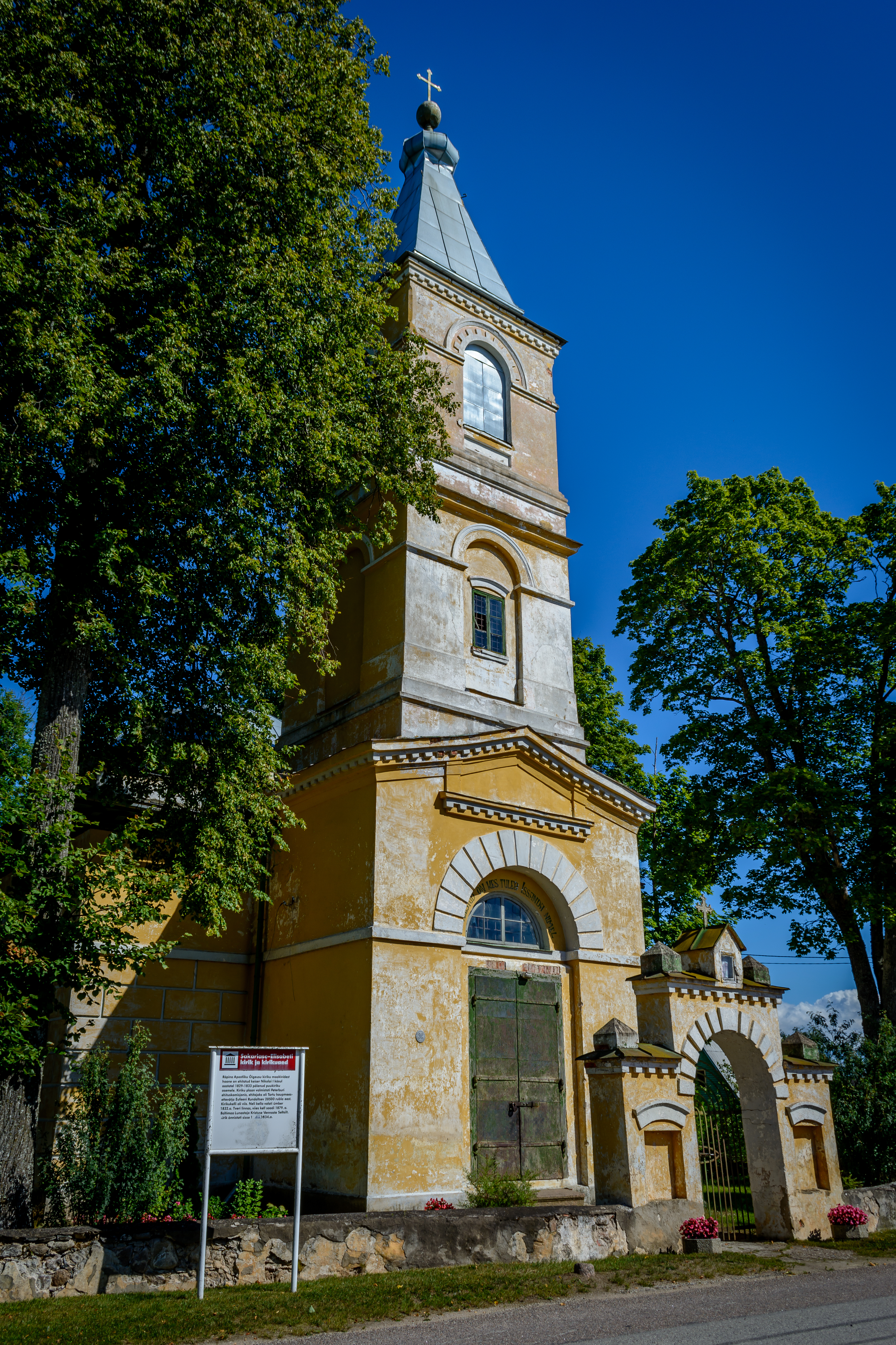 Räpina õigeusu kirik